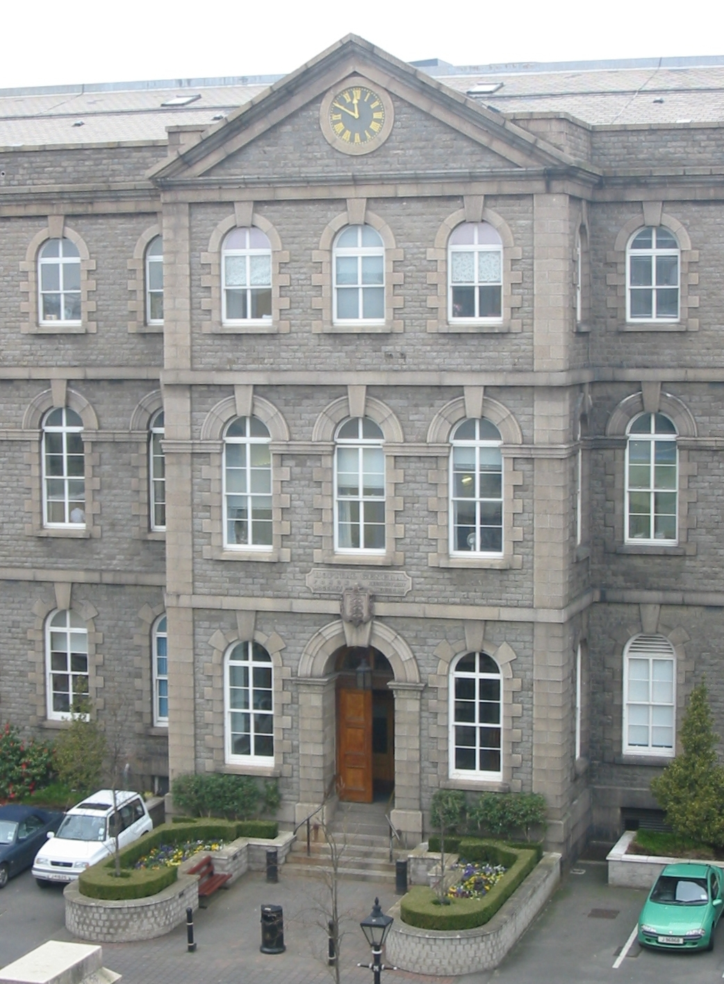 Nrf: Eune veue d'la côtchiéthe d'l'Hôpita d'Jèrri dans la Rue d'l'Hôpita, Saint Hélyi